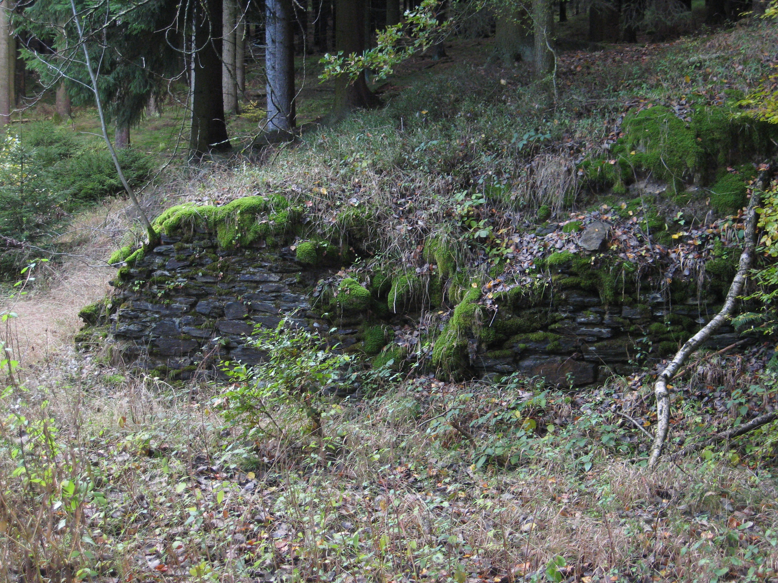 Mauerreste in der Nähe des ehemaligen Arbacher Schachtes.